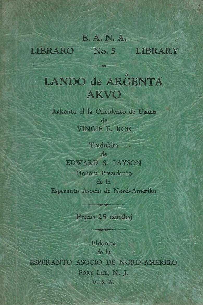 librokovrilo de "Lando de Arĝenta_Akvo", 1931